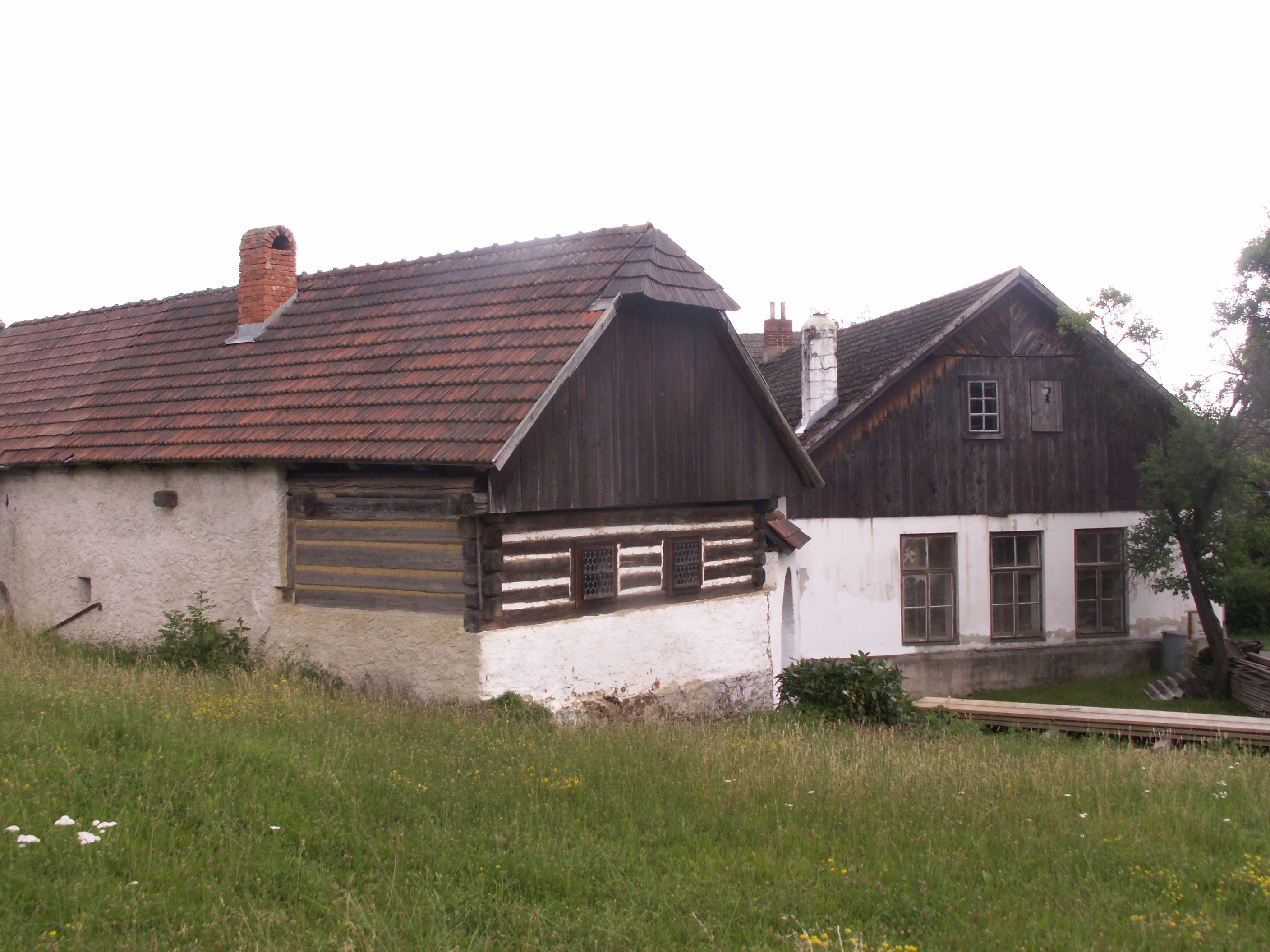 nemovitá kulturní památka Michalův statek v obci Pohleď (okres Havlíčkův Brod)